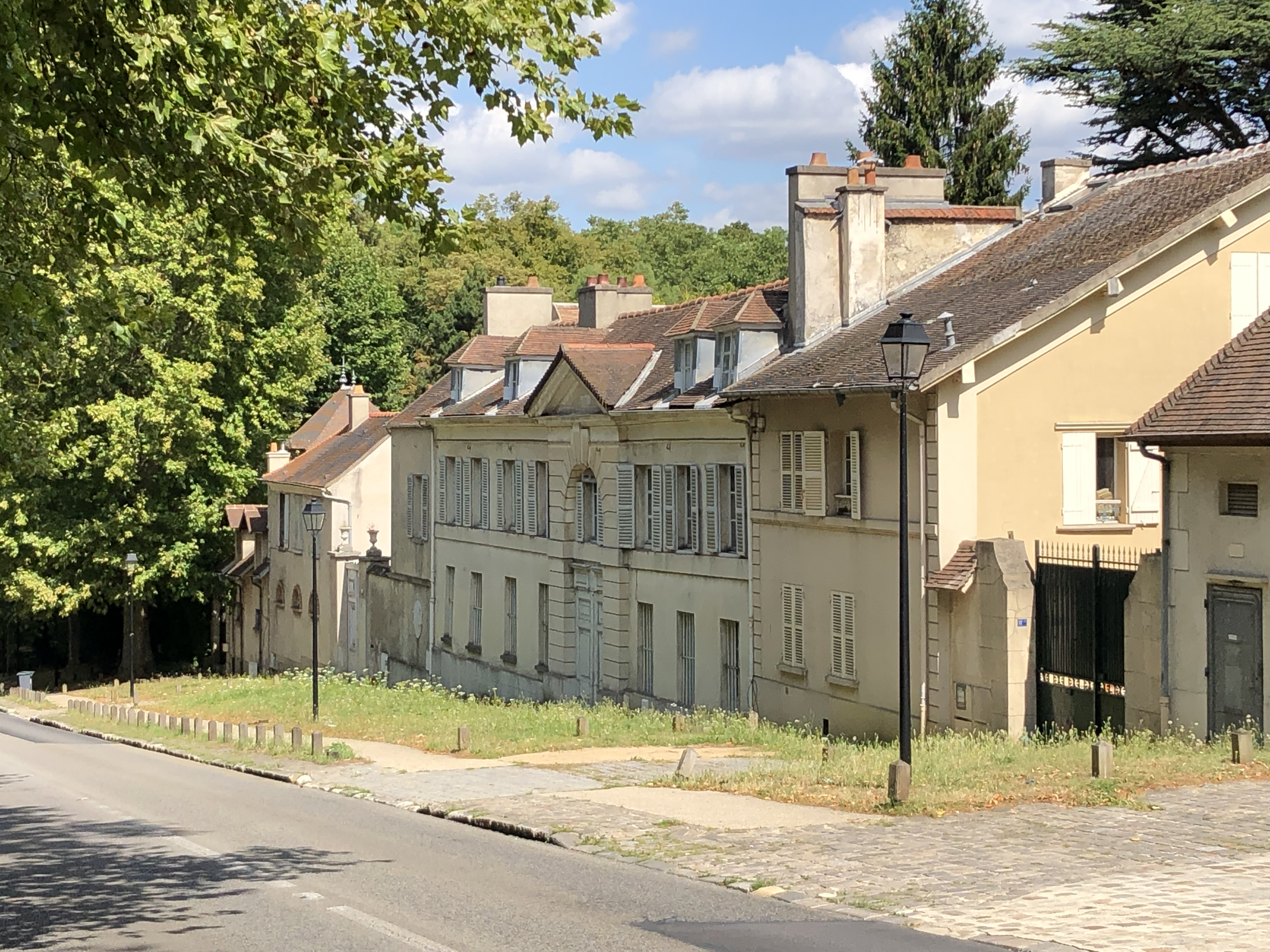 La maison Pellechet au Coeur Volant à Louveciennes